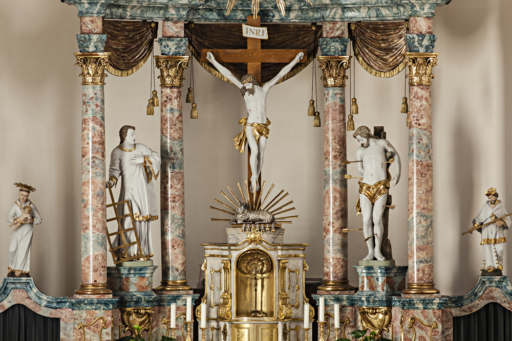 Hochaltar der St. Laurentius-Kirche in Alzenau-Michelbach